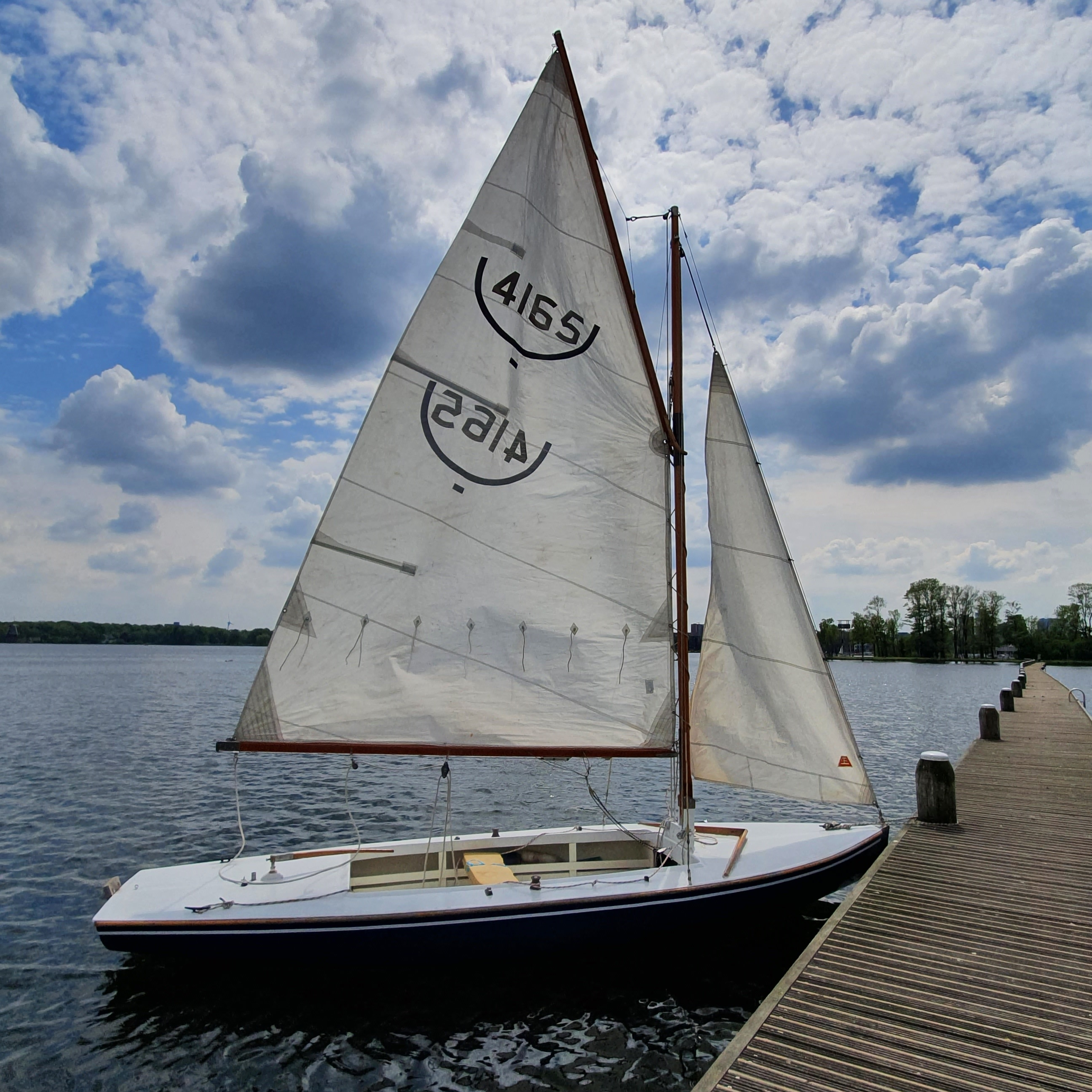 Op deze afbeelding is goed te zien wat de verhoudingen en afmetingen van de 16m2 zijn.